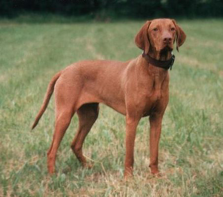 Visla, Kurzhaar